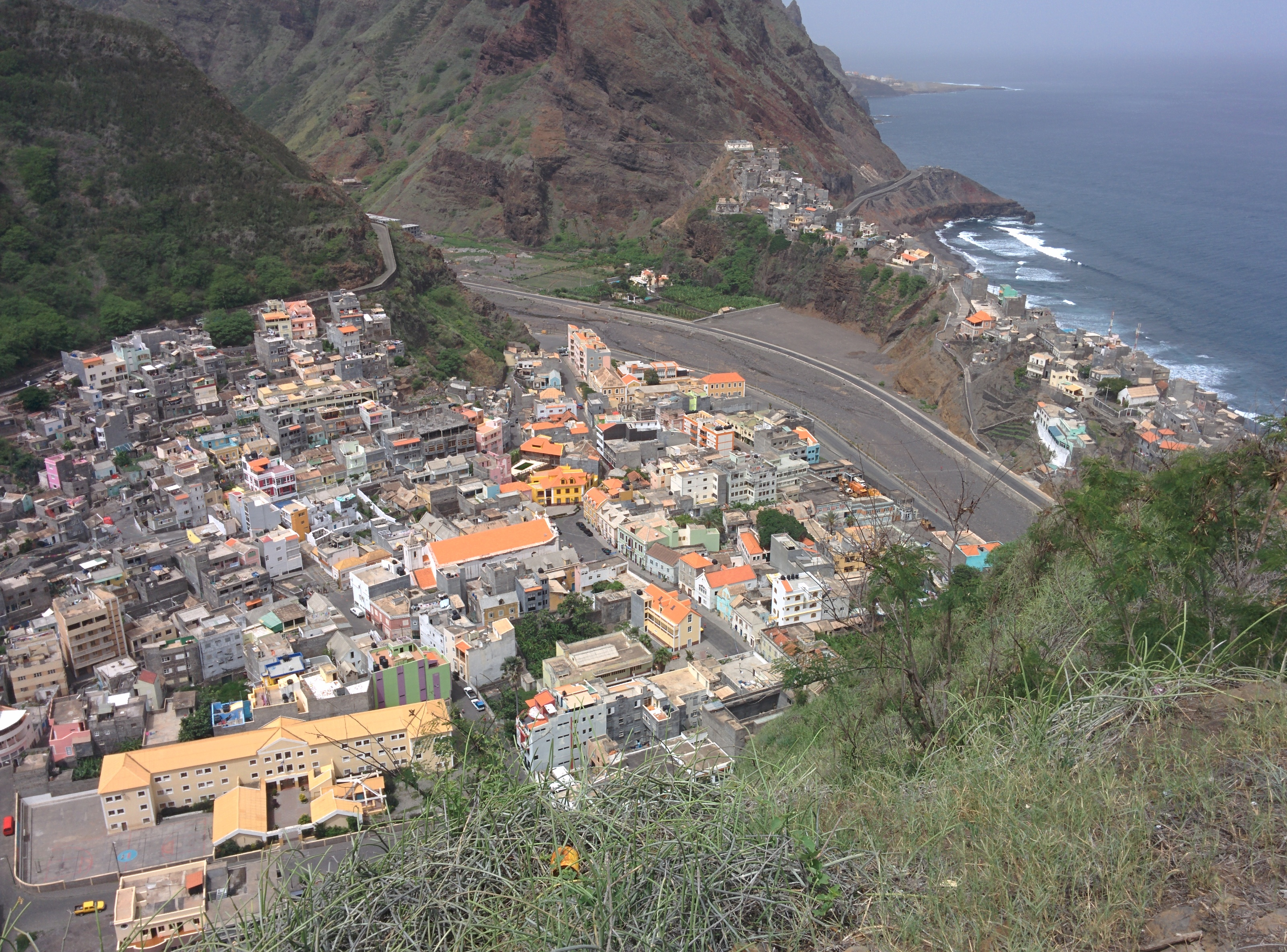 Ribeira Grande, Cape Verde